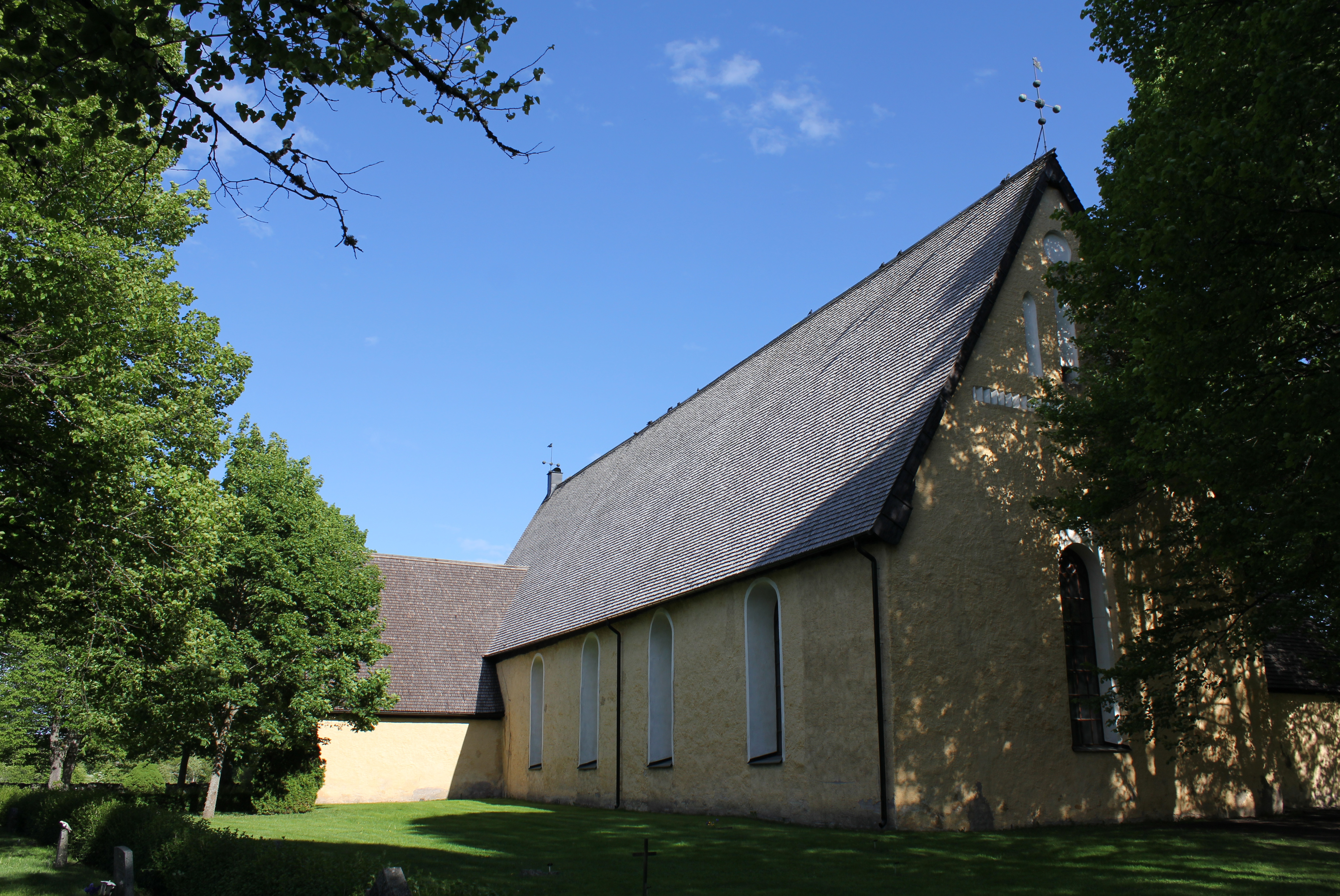 Veckholms kyrka, Enköpings kommun.